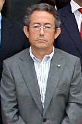 Ángel Lunam PSPV